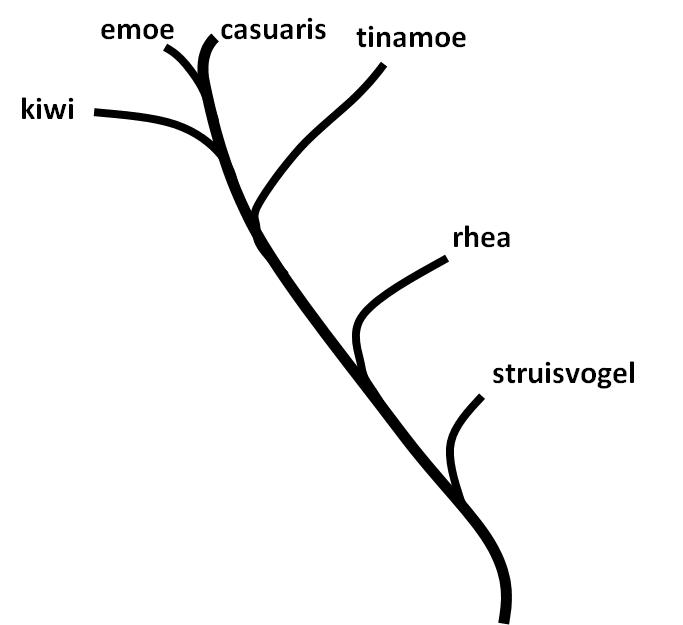 Nieuwe stamboom van de Struthioniforms volget Hackett et al.'s DNA resultaten